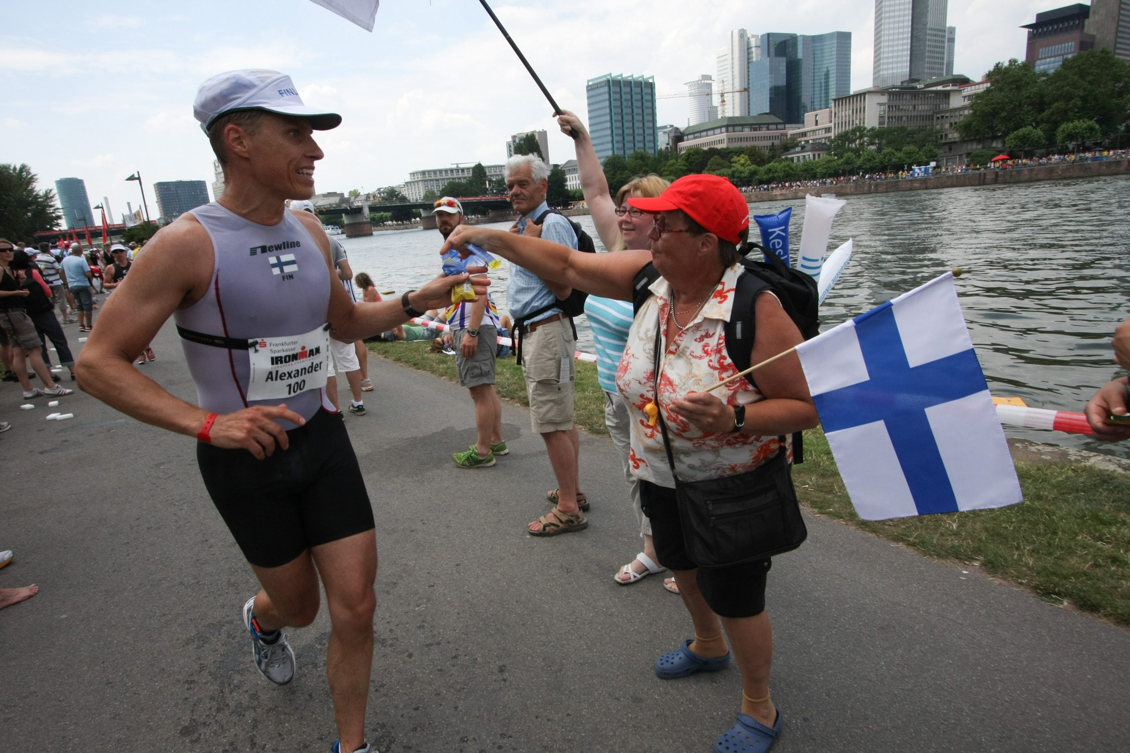 Alexander Stubb beim Ironman Frankfurt 2009, damals Außenminister von Finnland.